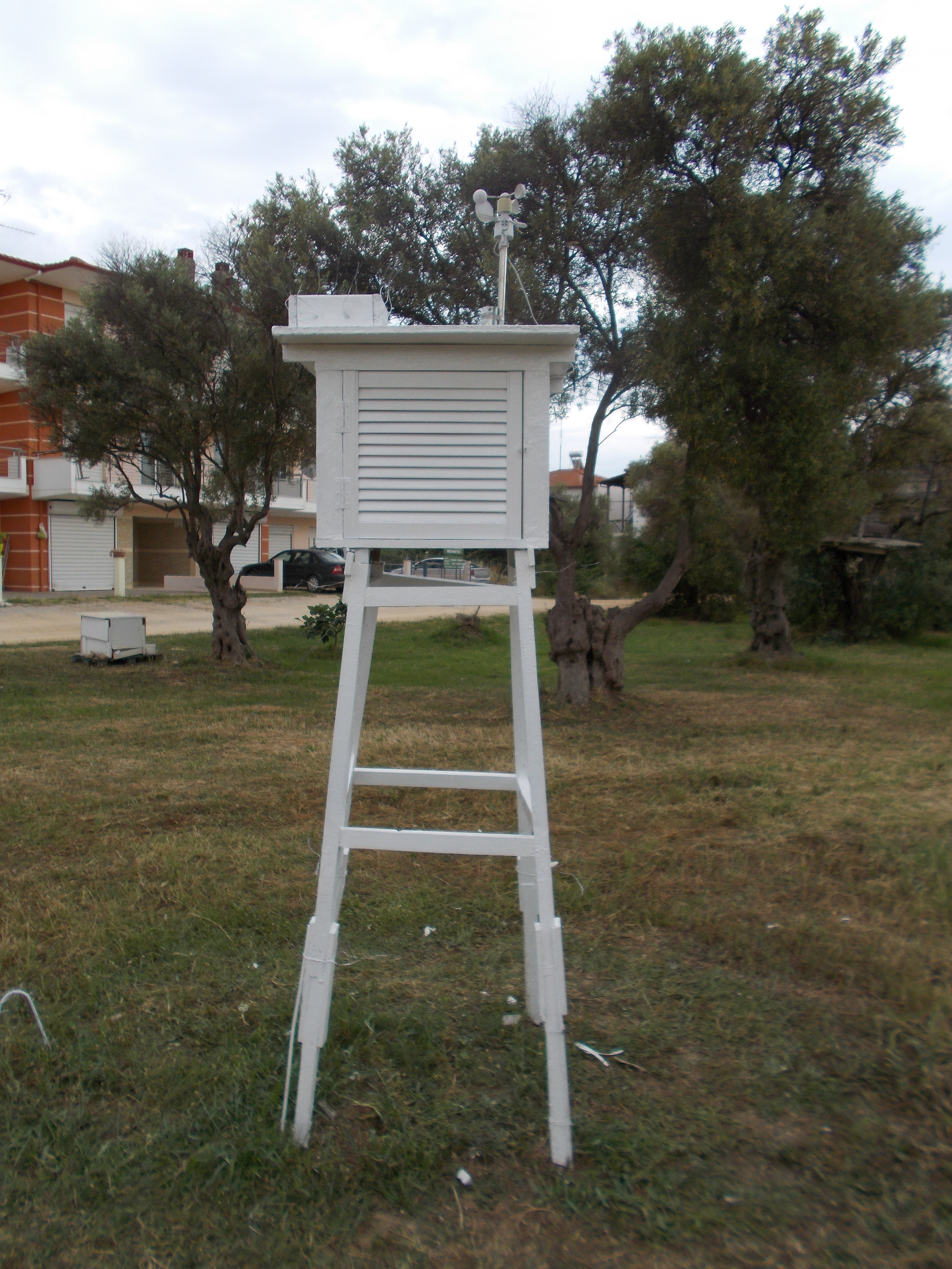 Ο μετεωρολογικός κλωβός του σταθμού των Νέων Μουδανιών Χαλκιδικής. Ξύλινος κλωβός τύπου stevenson screen, εξοπλισμένος με ηλεκτρονικά όργανα καταγραφής των μετεωρολογικών παραμέτρων. Διακρίνονται στην όροφή αριστερά το βροχόμετρο, και δεξιά το σύστημα ανεμόμετρο-ανεμοδείκτης.Μέσα στον κλωβό βρίσκεται ο αισθητήρας θερμοκρασίας-υγρασίας προφυλαγμένος από την ηλιακή και γήινη ακτινοβολία για ακριβείς μετρήσεις.